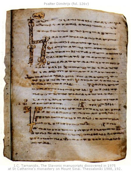 Псалтырь Димитрия алтарника , рукопись на глаголице 12-13 века